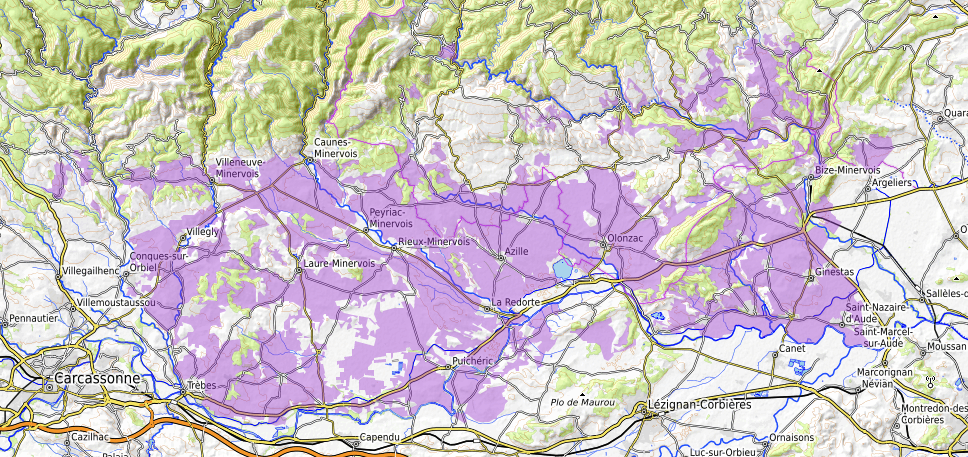 carte réalisée sur umap, [1]